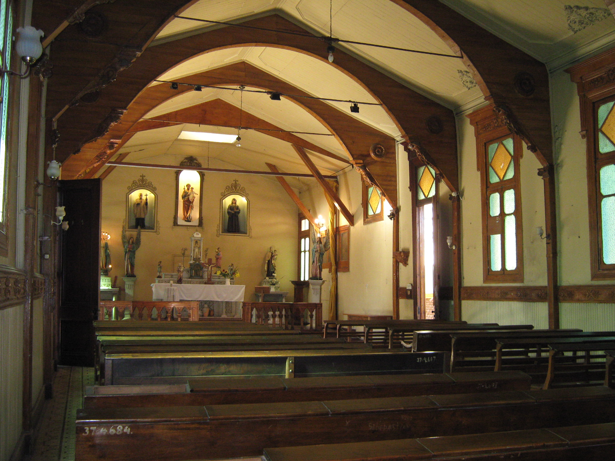 Hospital San José (Santiago); Es lo que ahora, con el nuevo hospital, no se ve. Es algo especial este lugar, eriza el cabello acercarse... This is a photo of a national monument in Chile: 408